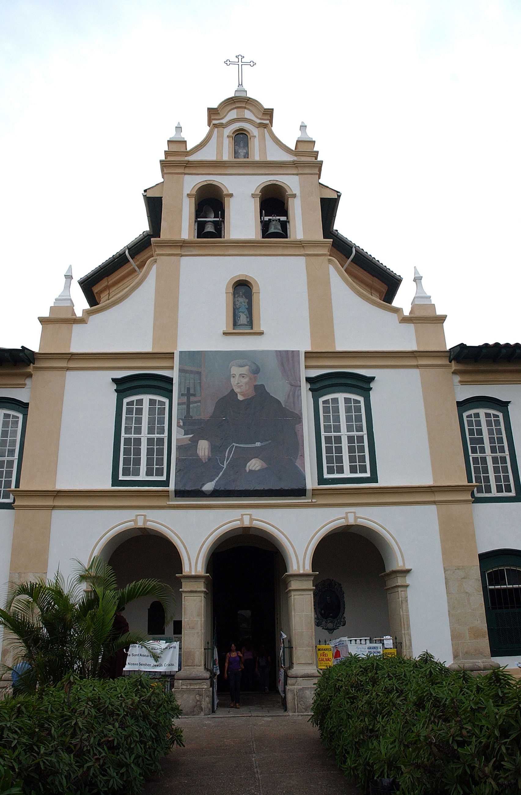 Imagem do Mosteiro da Luz